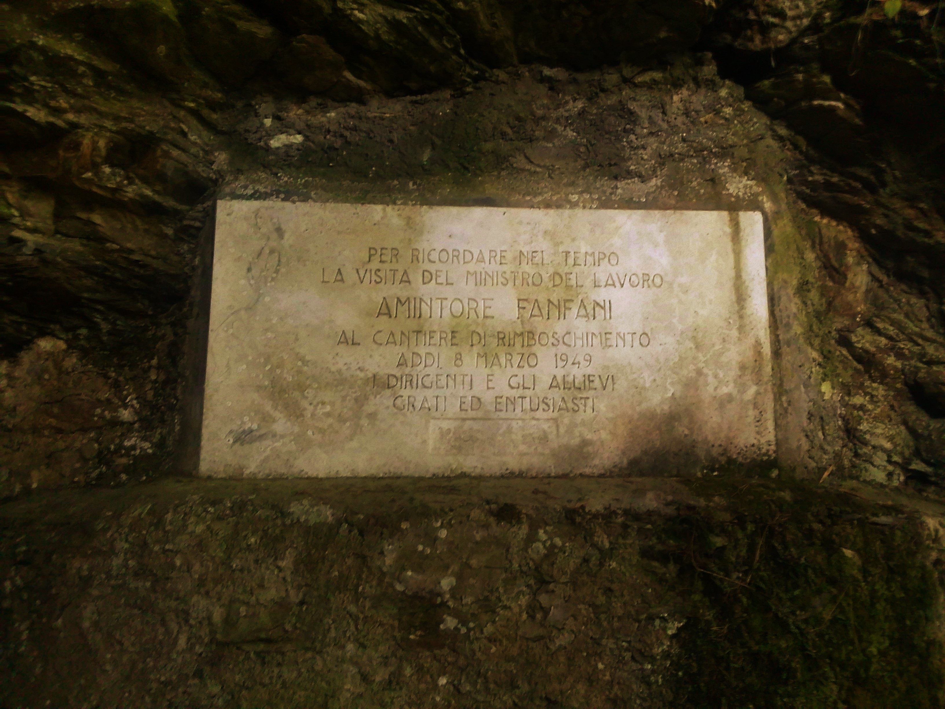 Lapide dedicata al ministro Amintore Fanfani, in visita a Retignano l'8 marzo 1949.